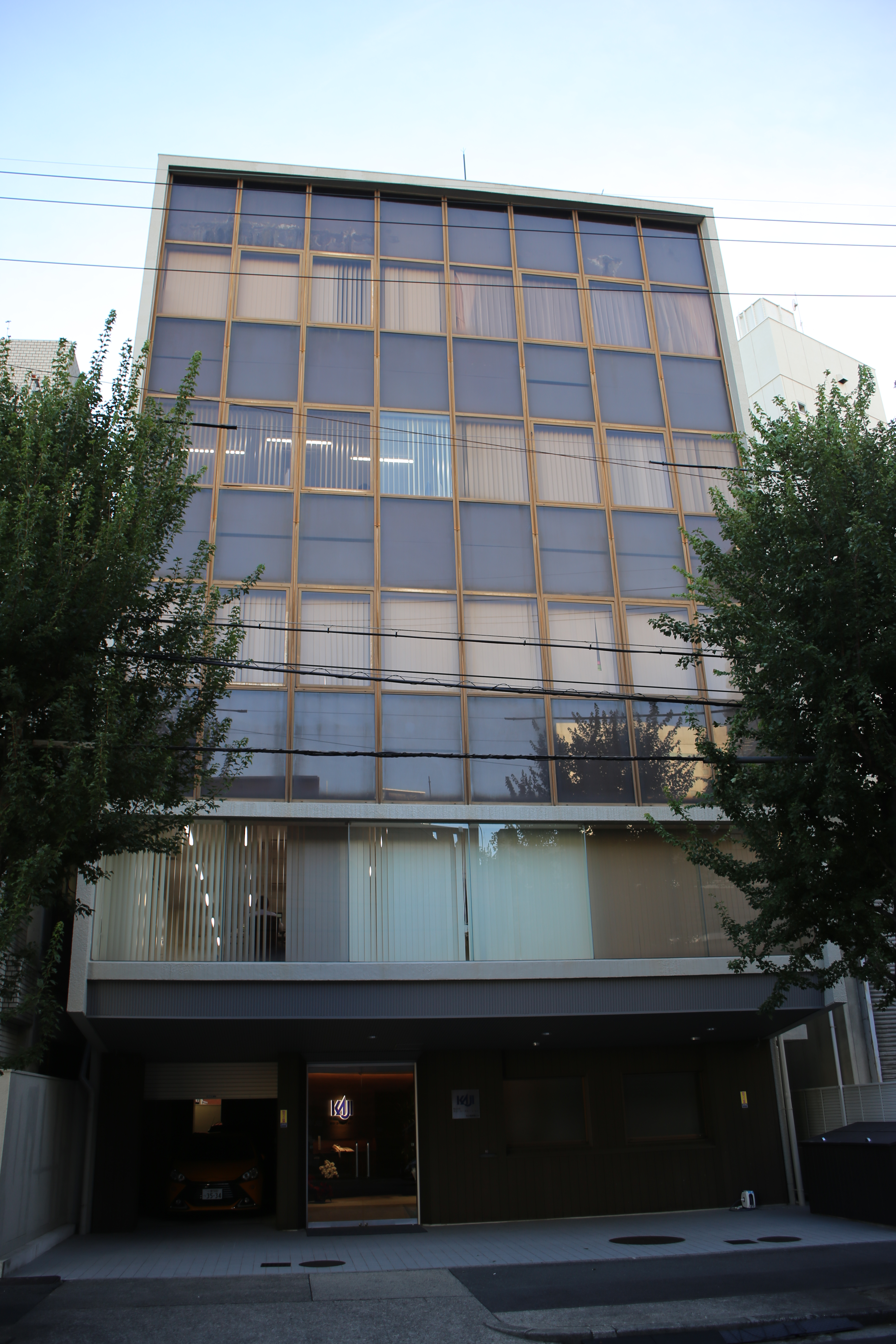 名古屋市中村区名駅南一丁目のカジ・コーポレーション本社